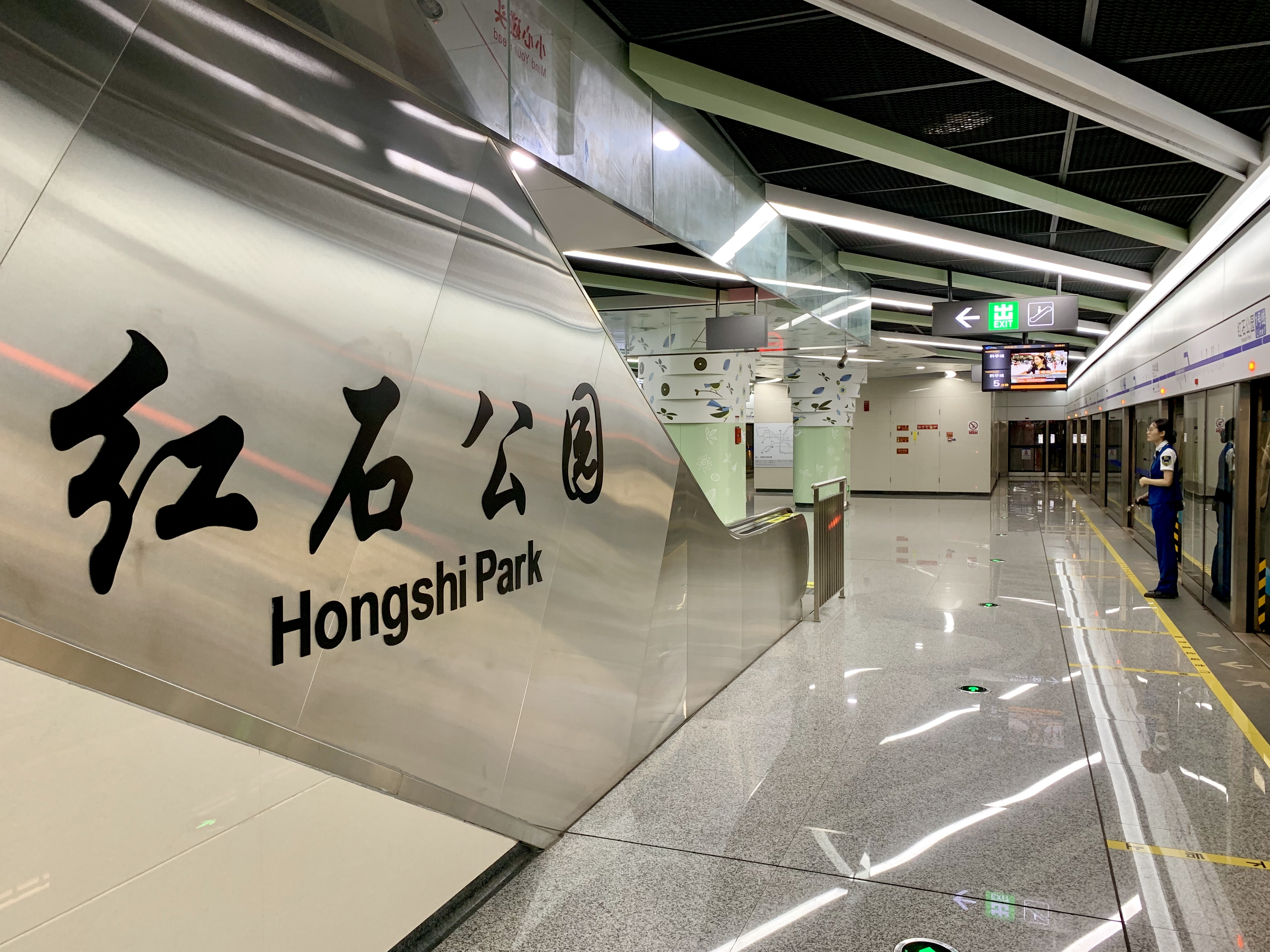 成都地铁红石公园站